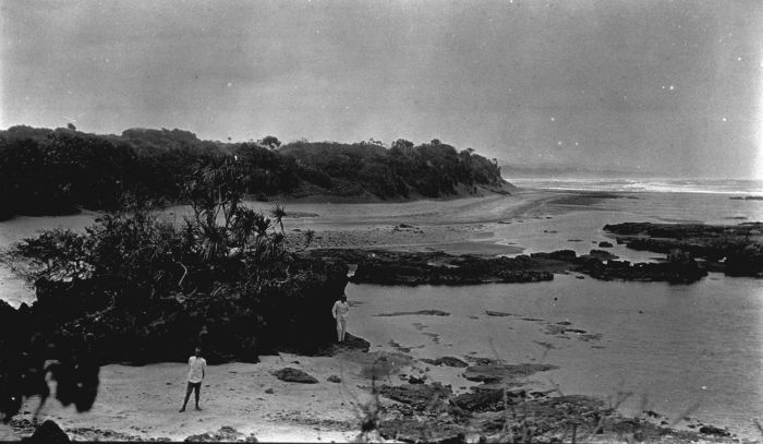 Foto. Strand met duinen ten zuiden van Pameungpeuk, West-Java